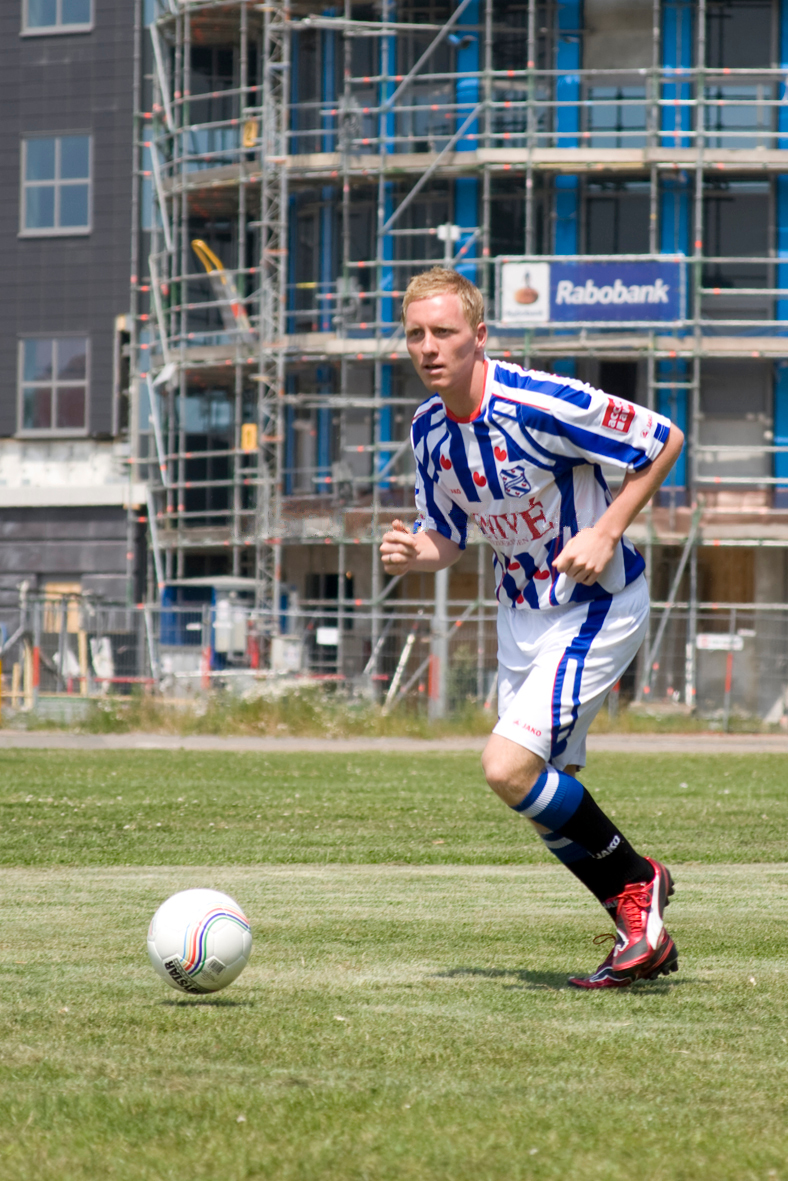 Henrico Drost